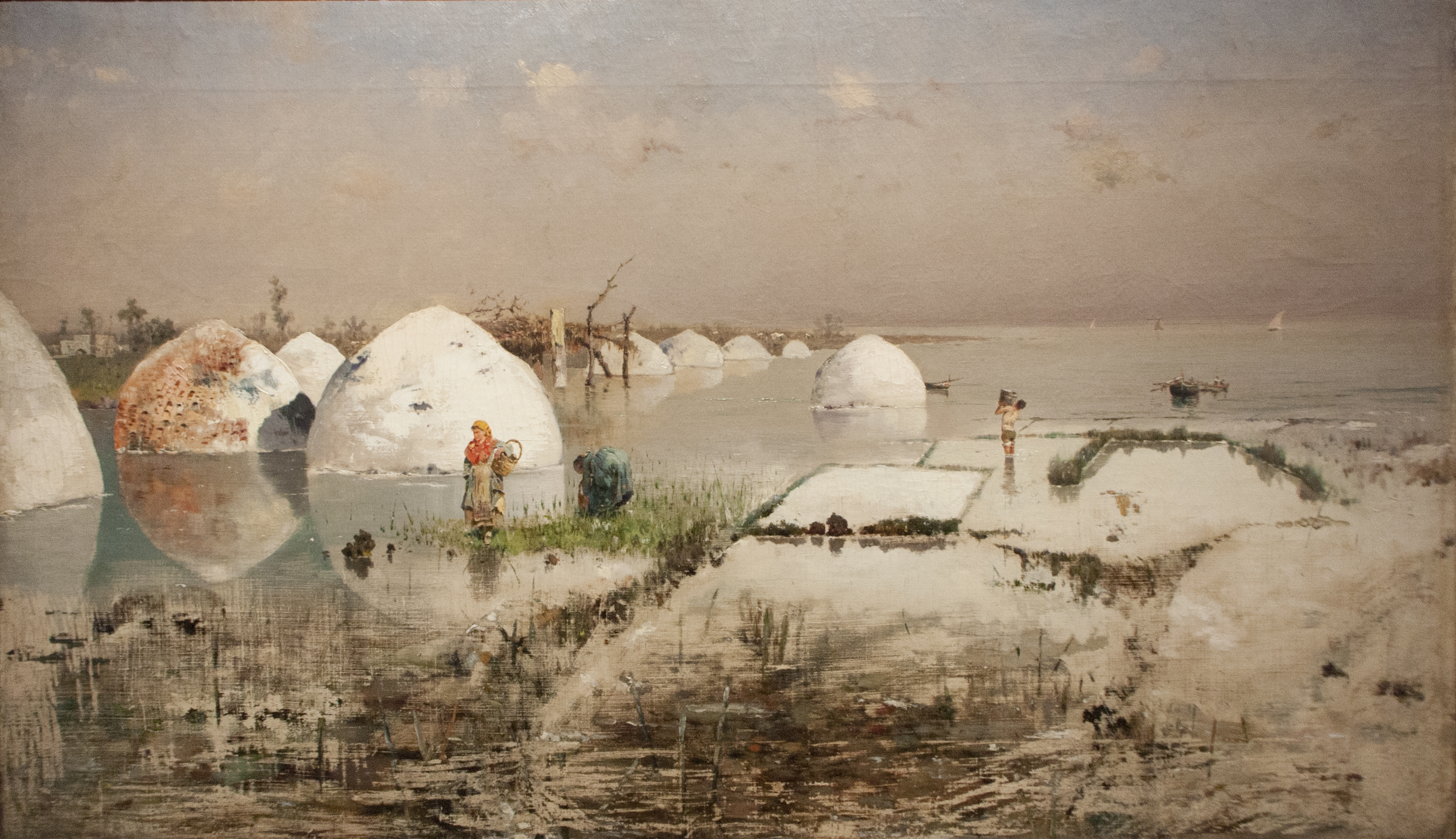 Saline di Trapani - Antonino Leto olio su tela 1881